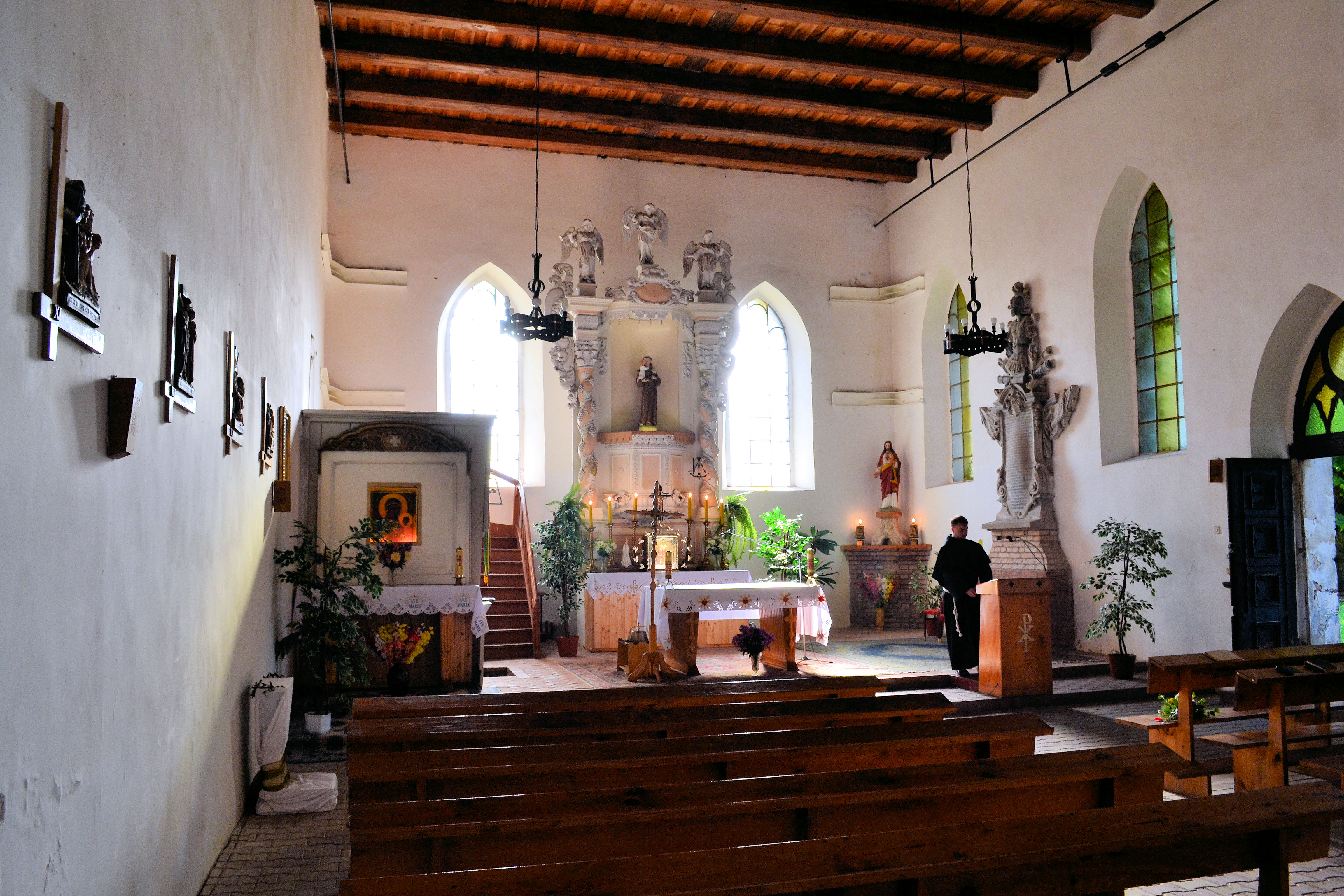 Kościół św. Antoniego Padewskiego w Buku (powiat policki)